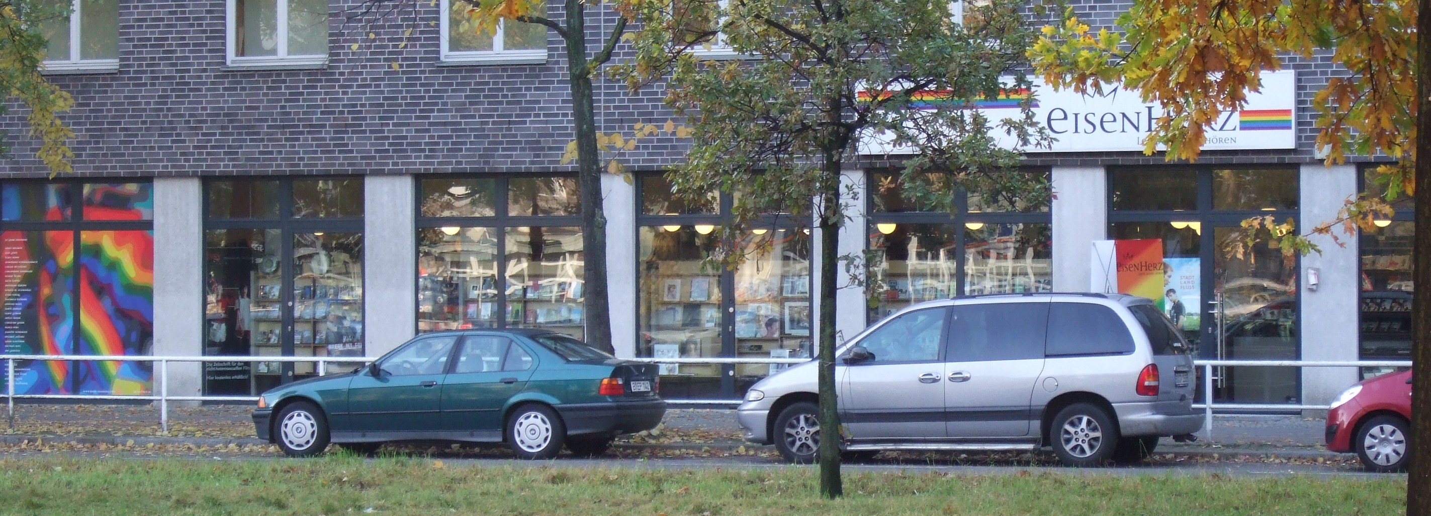 Berlin - Buchhandung Eisenherz